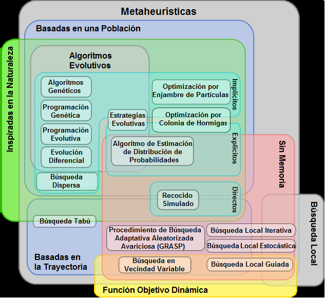 Versión de diagrama "clasificación de las metaheurísticas" de Wikipedia "Metaheuristics classification fr.svg"